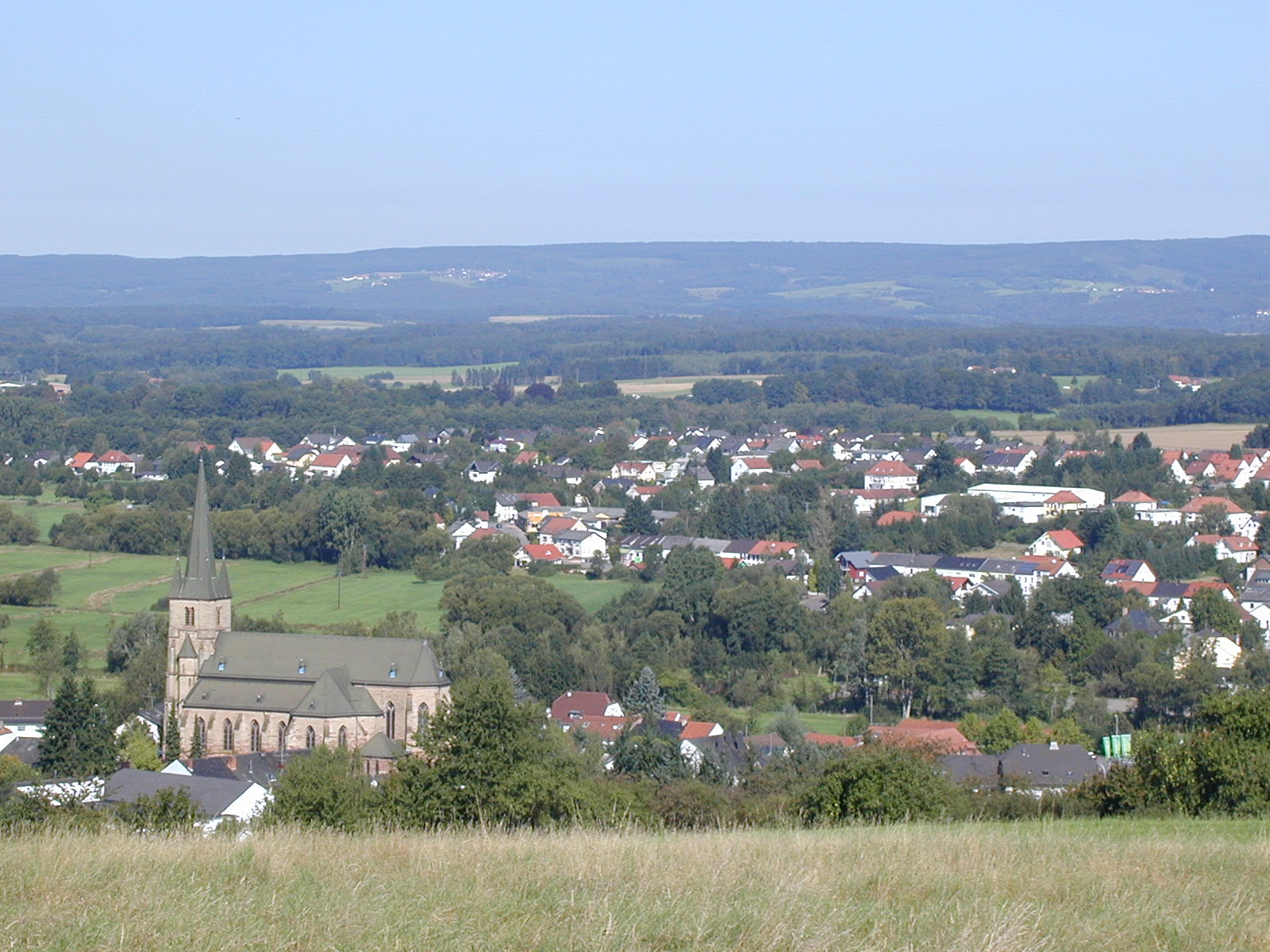 Ortsansicht von Nunkirchen